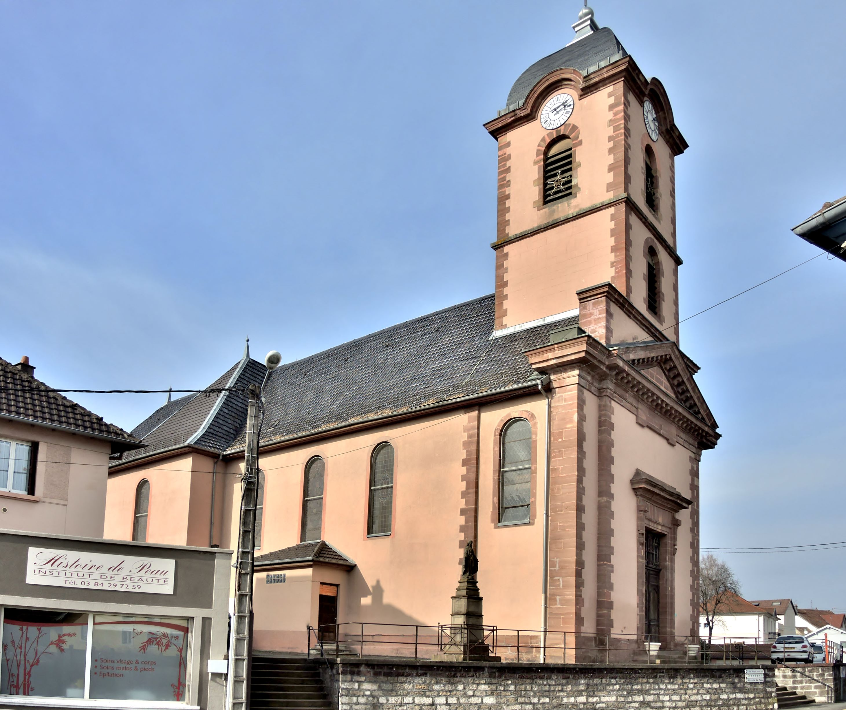 Eglise saint Etienne de Châtenois-les-Forges. Territoire de Belfort.